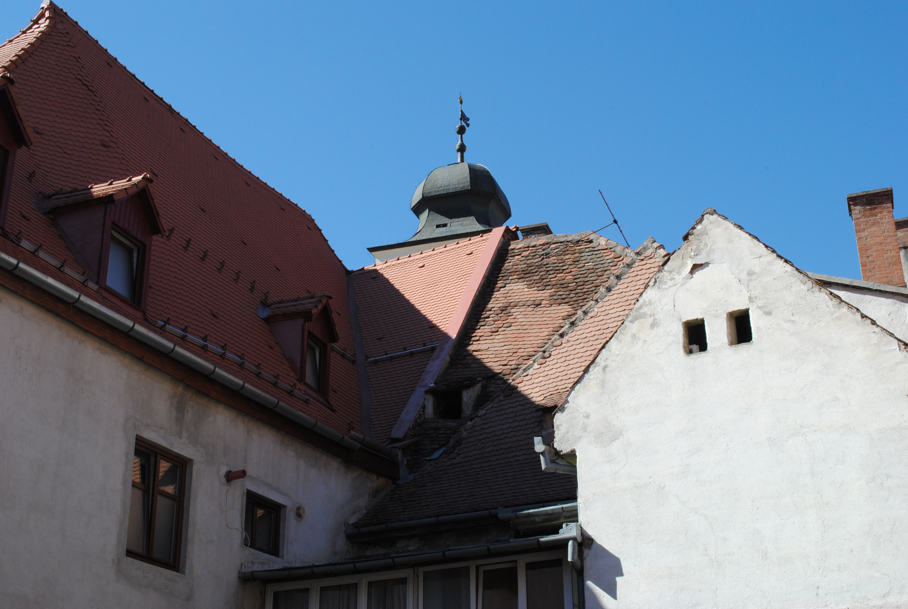 Casă, sec. XV, cca. 1885 - 1900